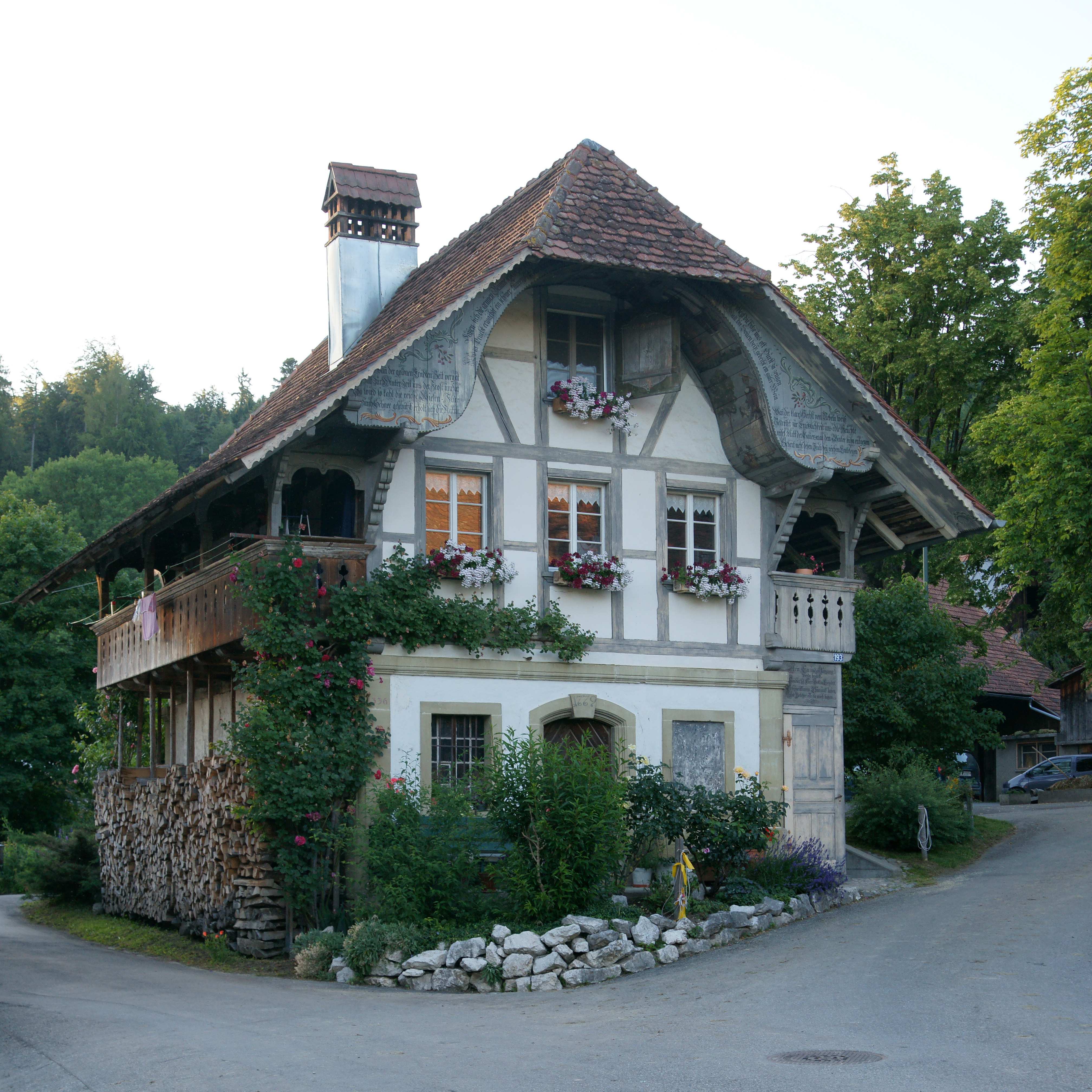 Schweizerisches Inventar der Kulturgüter von nationaler Bedeutung: Hof Burren, Mengestorf KGS-Nr. 992, Mengestorfbergstrasse 191 /193, Köniz (BE), 596.124 / 194.235, Kategorie: A, Objektart: Wohnbauten und ihre Nebenanlagen, Bauernhäuser, Stöckli